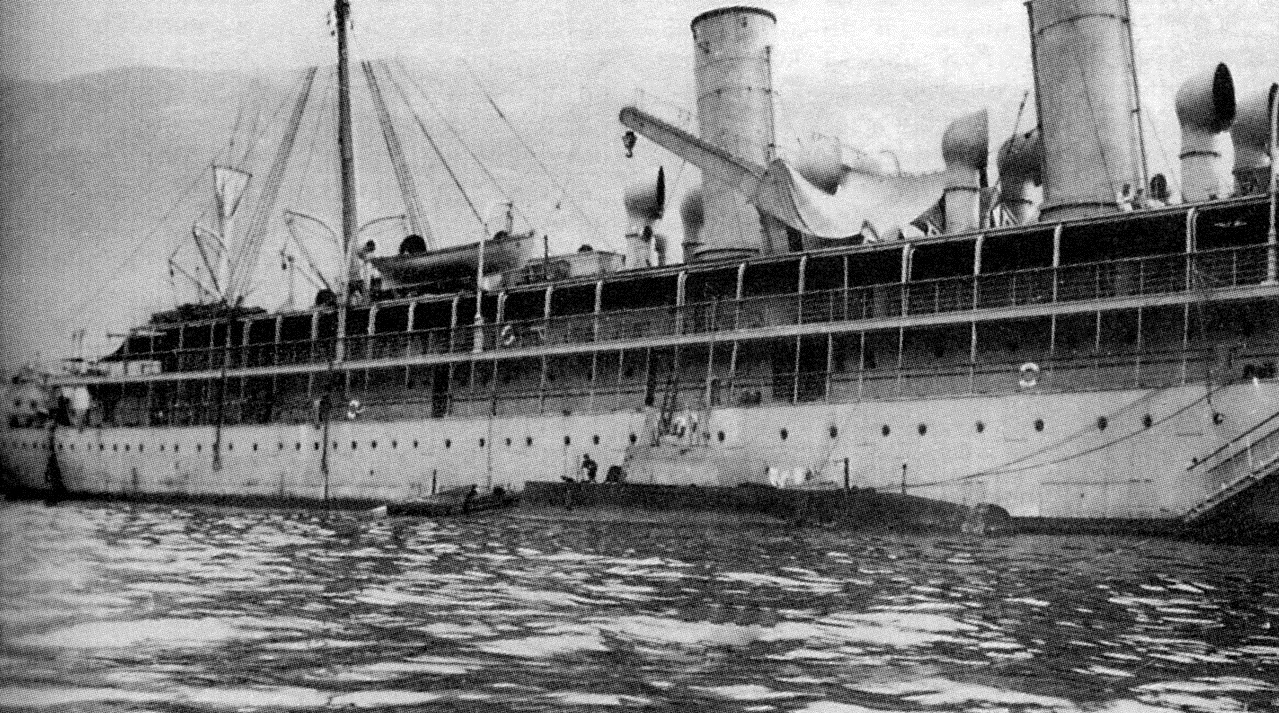 La nave appoggio austroungarica Gaa a Cattaro